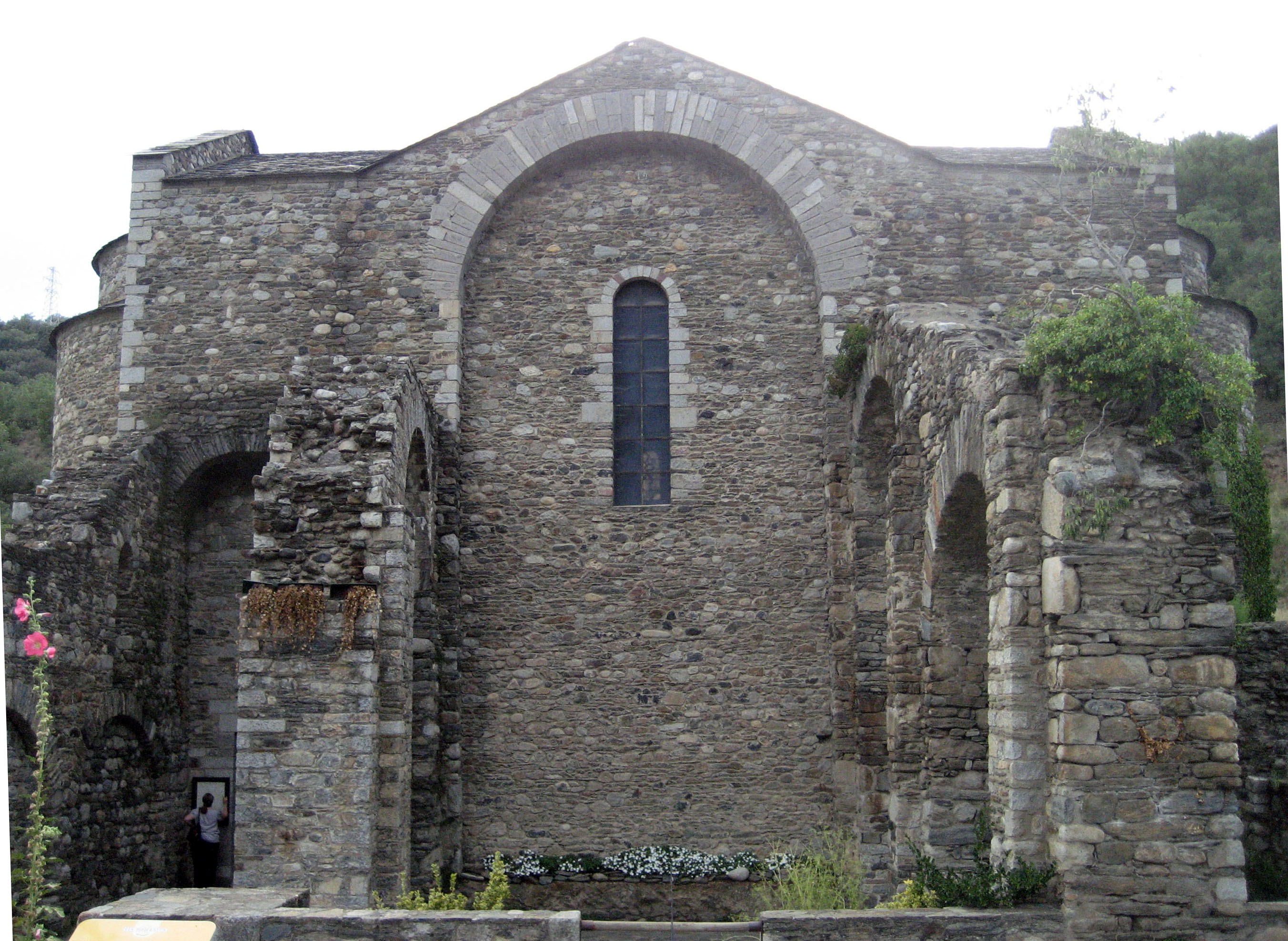 Naves del monasterio de Sant Sadurní de Tavèrnoles en Anserall de la comarca del Alto Urgel en Cataluña (España)